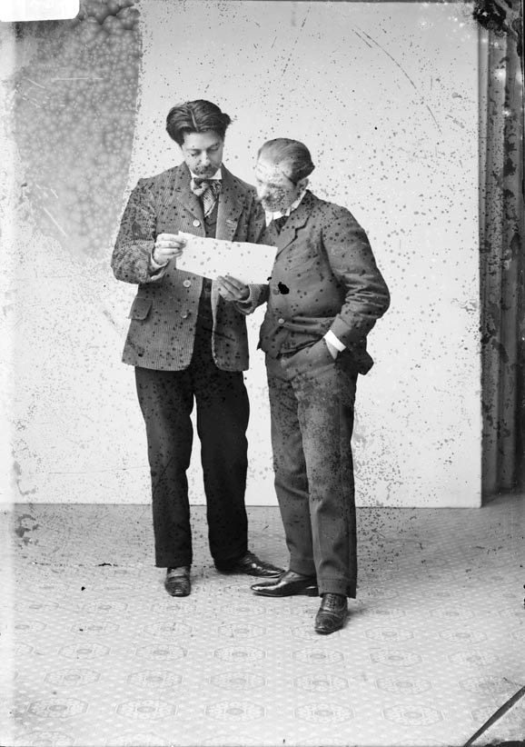 Retrat de cos sencer del pianista Enric Granados i Campiña (a l'esquerra) i del violoncel·lista Pau Casals i Defilló (a la dreta).